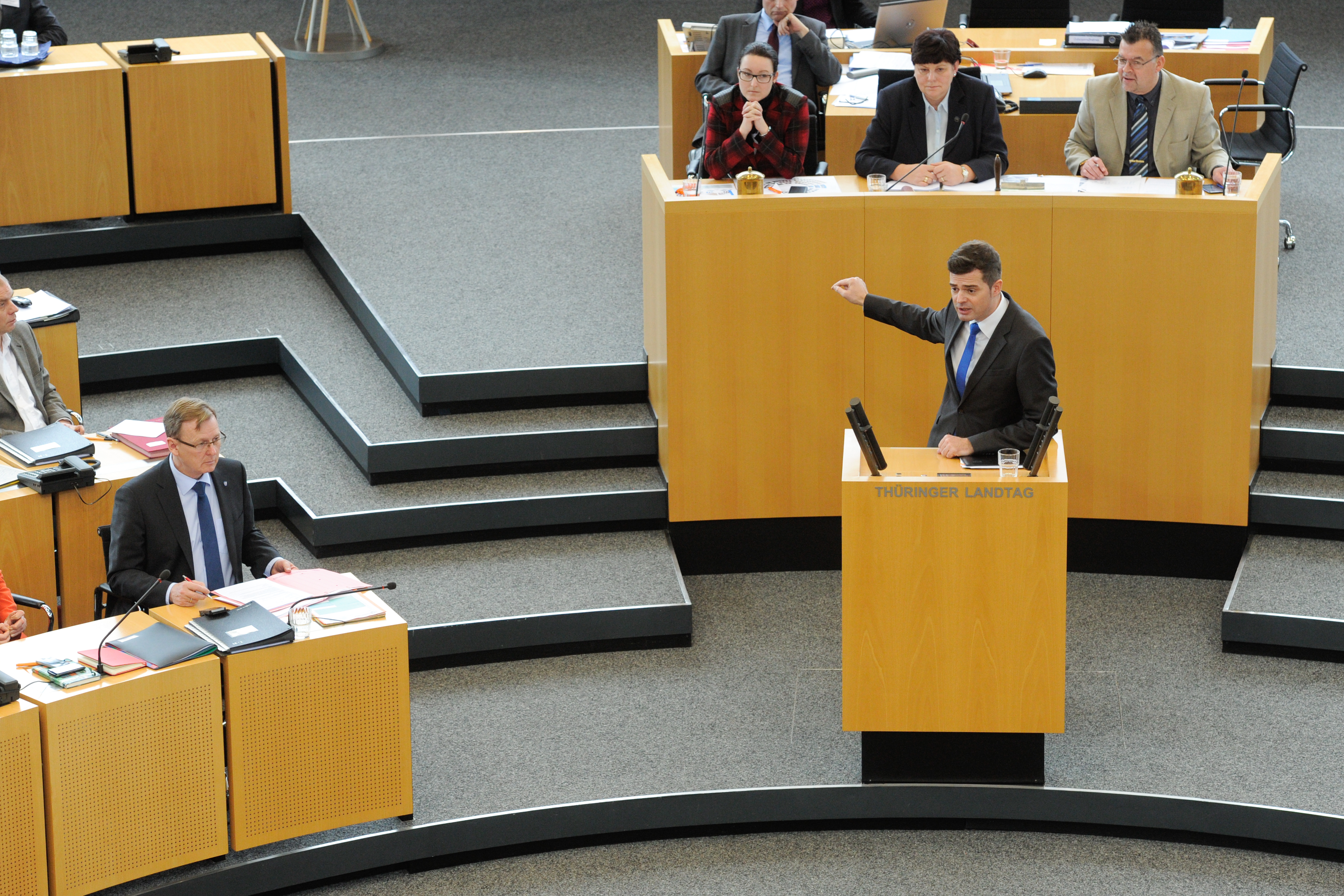 Mike Mohring gegen Bodo Ramelow